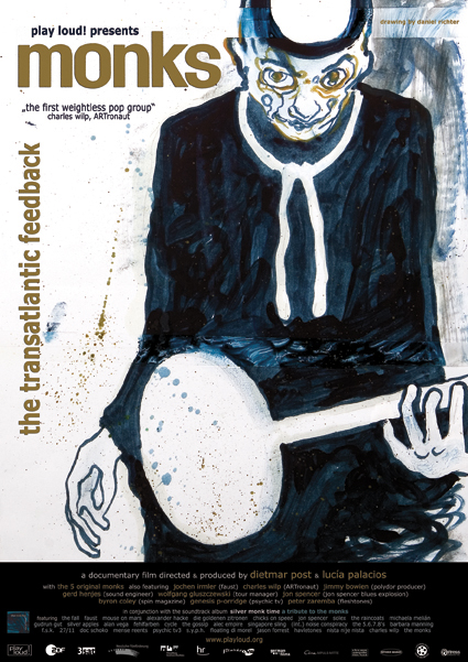 Filmposter: Monks: The Transatlantic Feedback